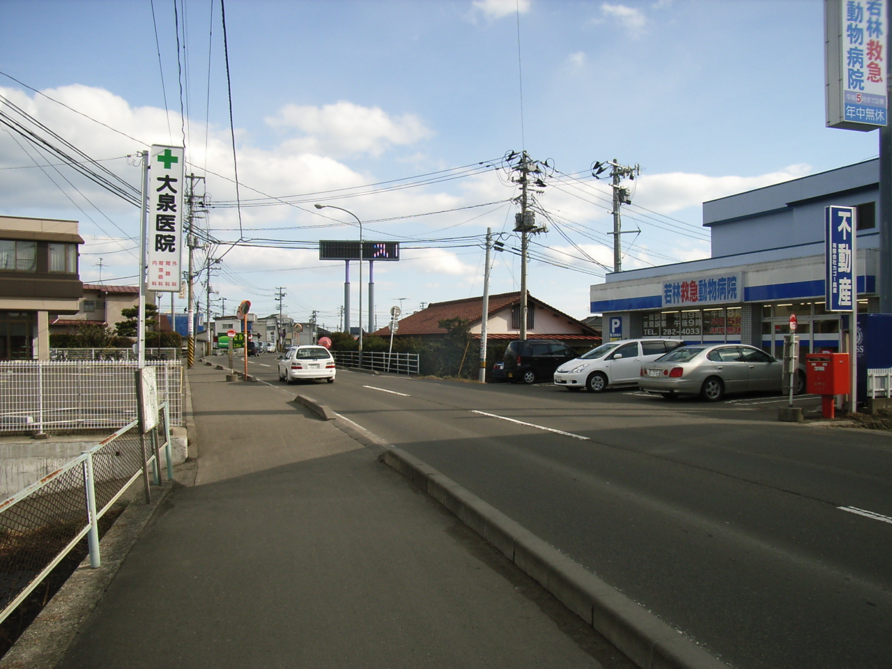 Miyagi Prefectural Road 54. Sendai, Miyagi prefecture, Japan.